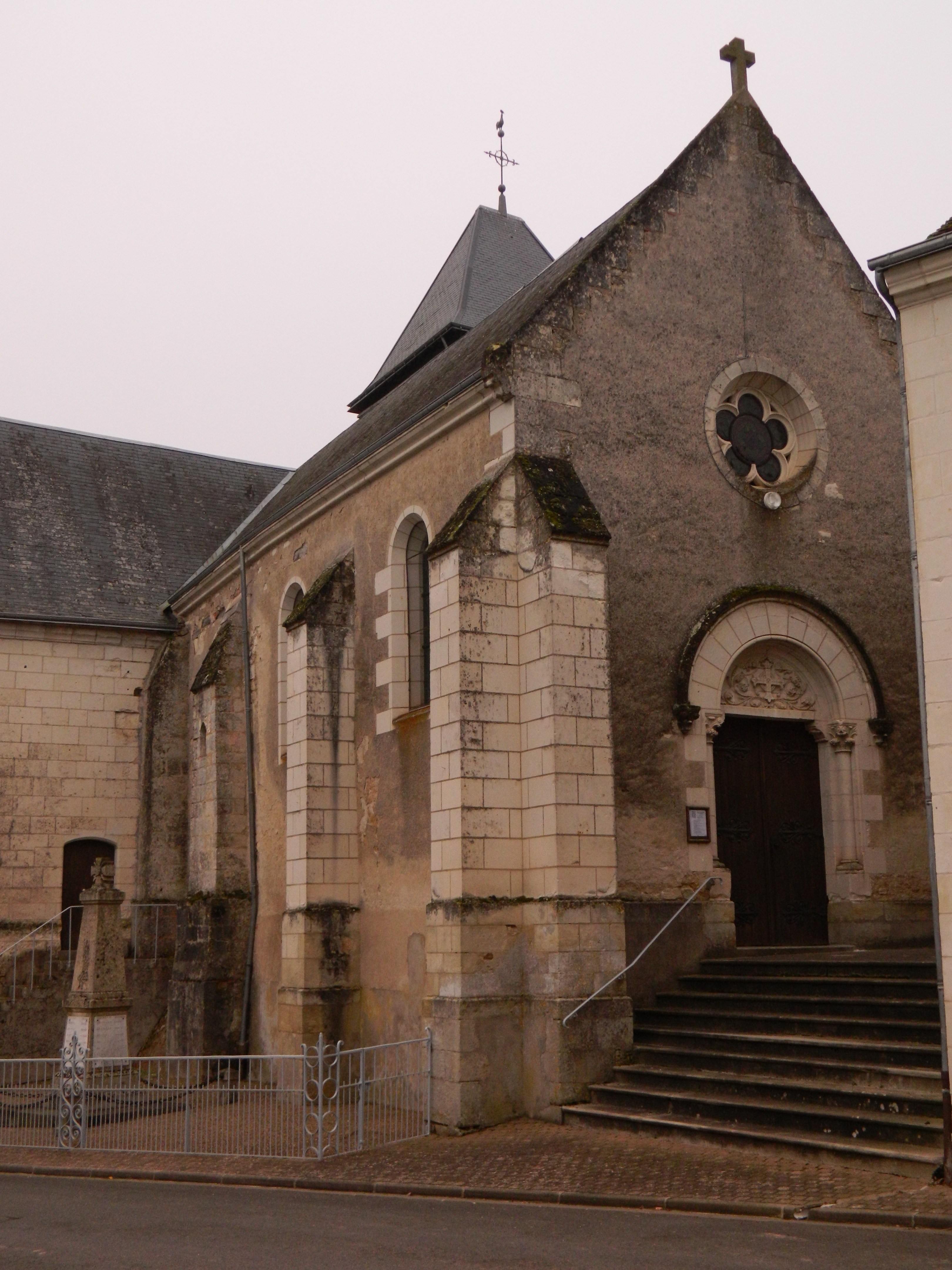 Église paroissiale Saint-Vincent de Chemillé-sur-Indrois .